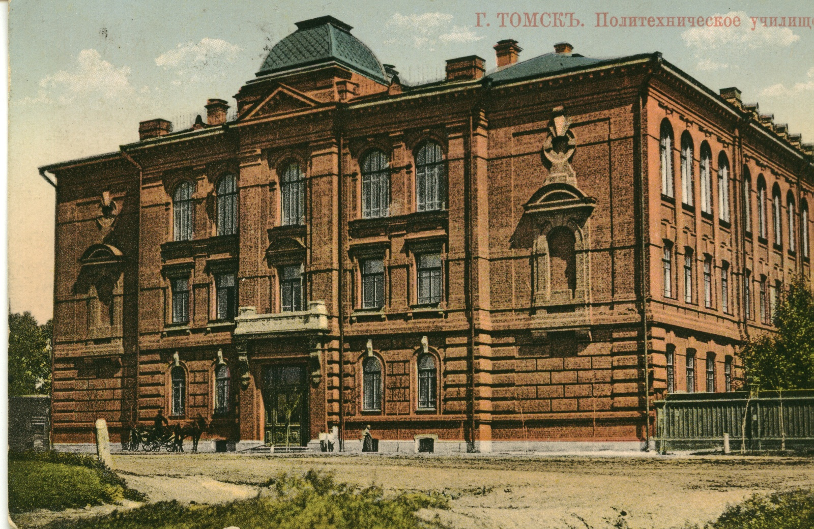 Коммерческое (с 1913 - политехническое) училище, ныне ТГАСУ, Соляная площадь 2 к. 2 (бывш. пер. Макушина 7), Томск